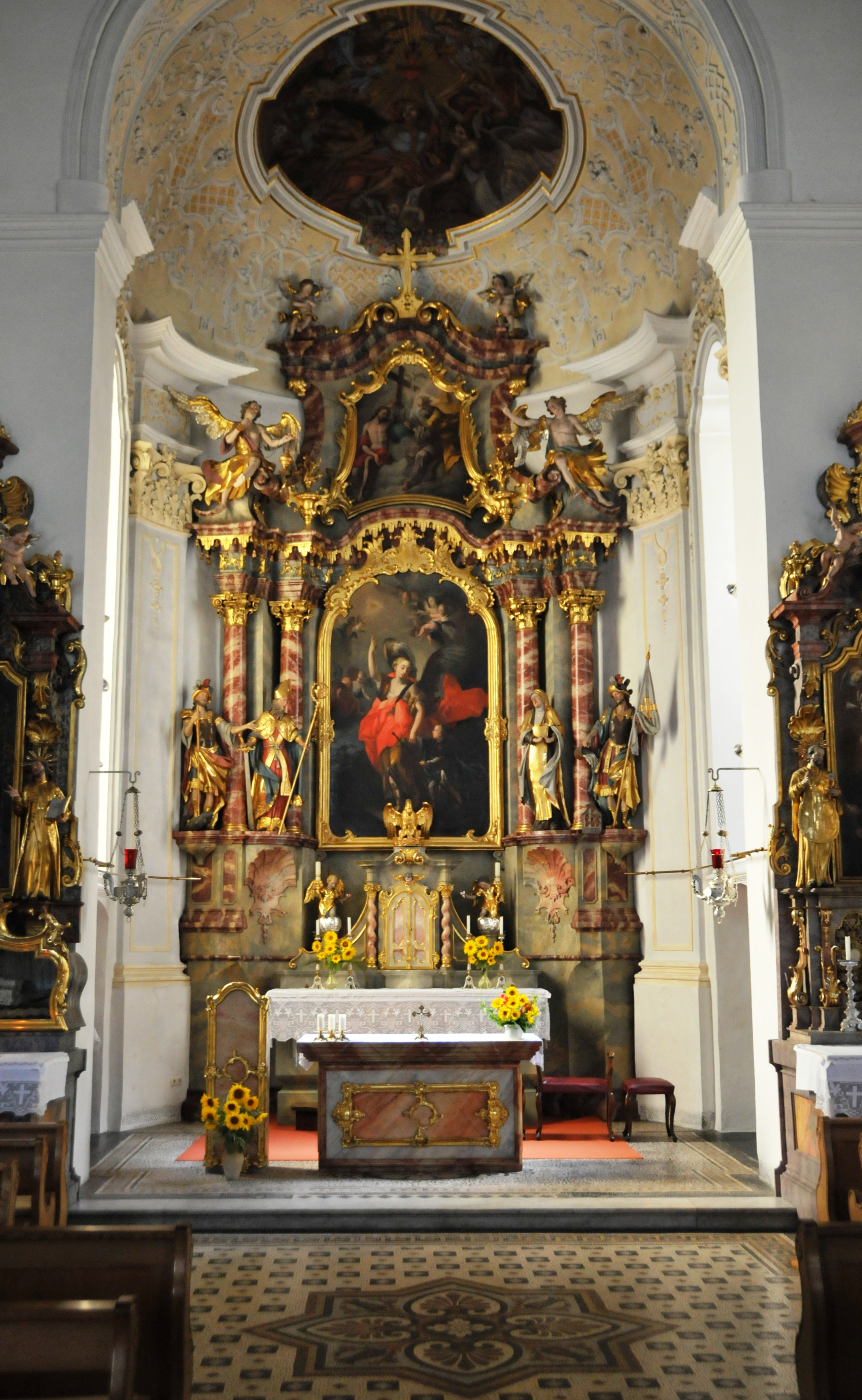 Burghausen, Schutzengel-Kirche